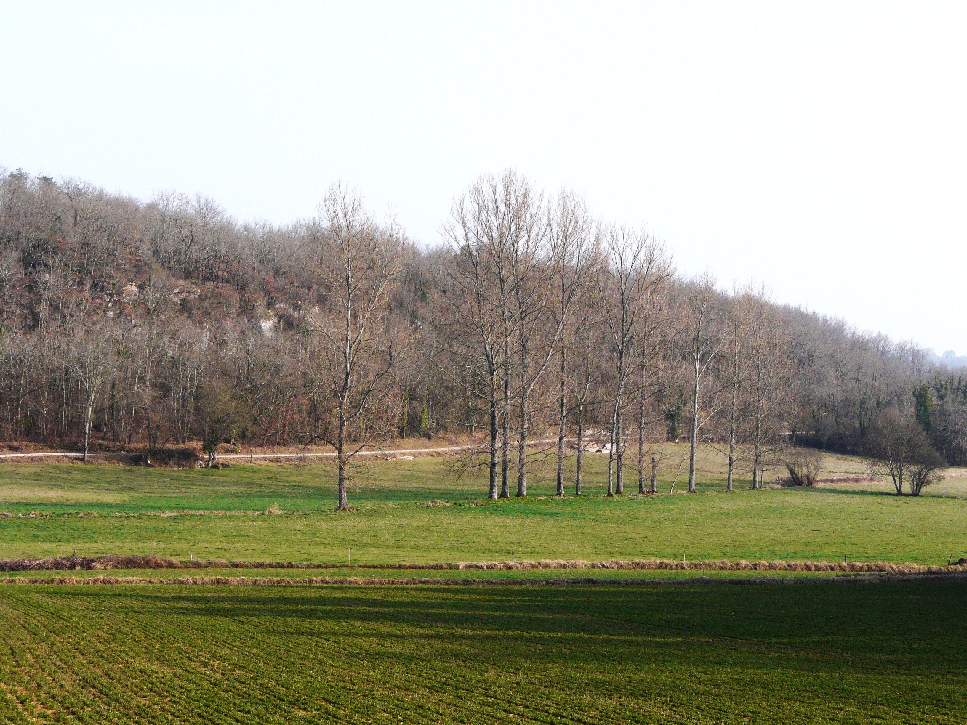 Le vallon de la Sandonie à l'est du lieu dit le Vieux Breuil, Paussac-et-Saint-Vivien, Dordogne, France. La ligne d'arbres isolés suit le tracé du ruisseau.